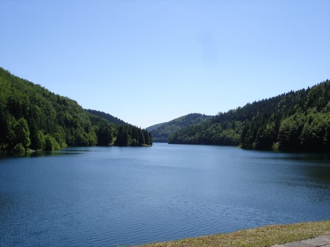 Trinkwassertalsperre Schönbrunn - Vorstau